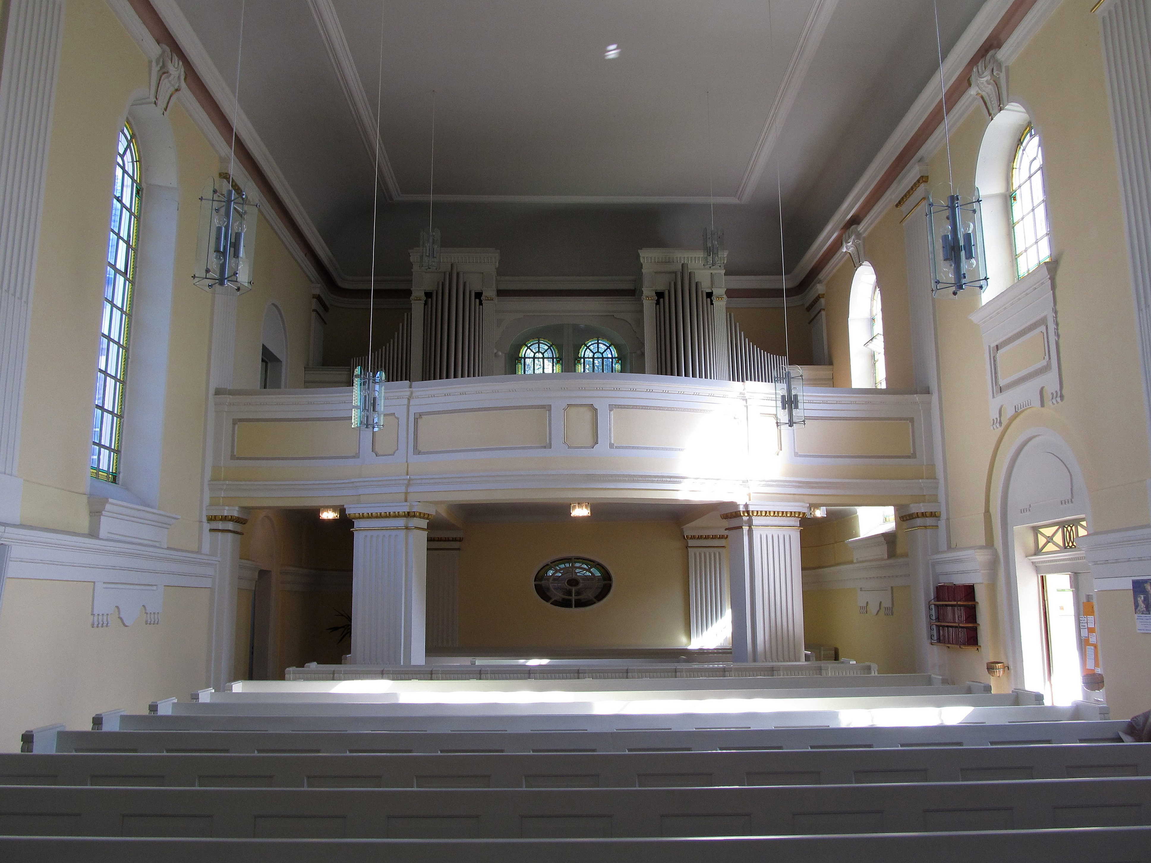 Blick ins Innere der protestantischen Kirche in Blieskastel, Saarland